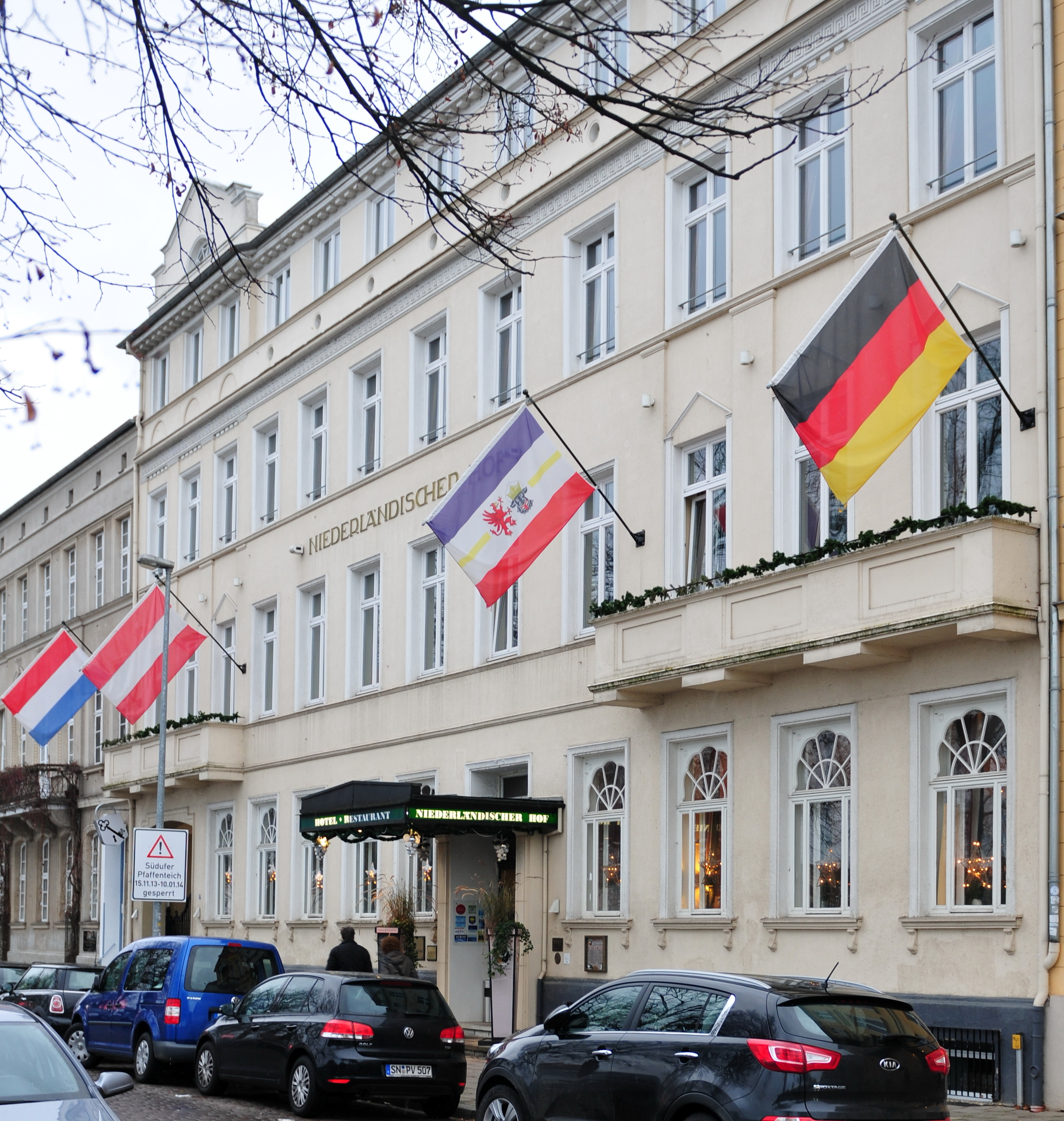 Das Hotel und Restaurant Niederländischer Hof in der Alexandrinenstraße in Schwerin liegt unweit des Hauptbahnhofs direkt am Pfaffenteich. Es ist denkmalgeschützt.